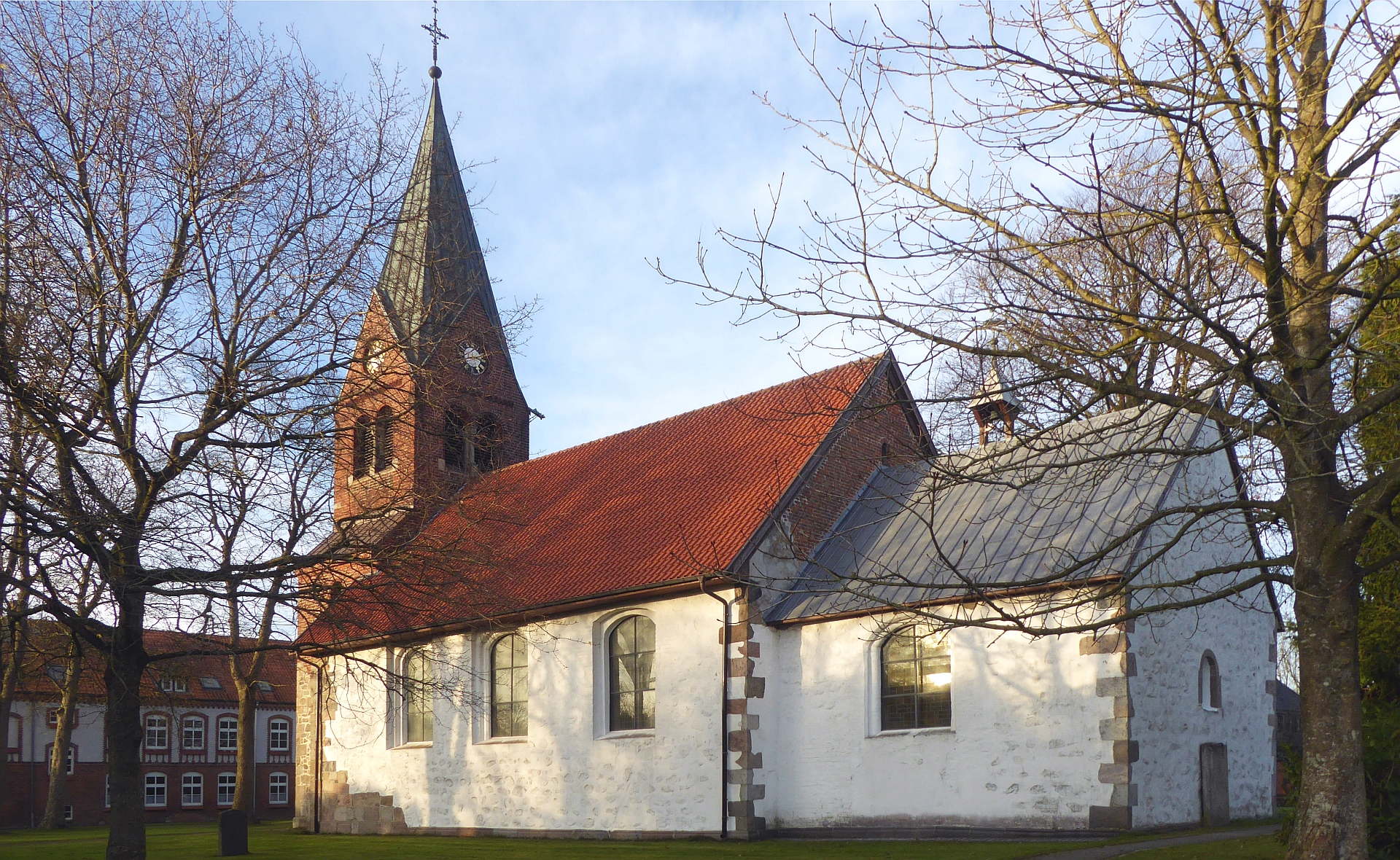 Satrup: die St.-Laurentiuskirche ist eine Feldsteinkirche ca. aus dem 12. Jahrhundert mit Natursteinquader-Klinker-Portal und -turm als Mischmauerwerk, errichtet 1903 - Foto 2018 Wolfgang Pehlemann P1280559.jpg